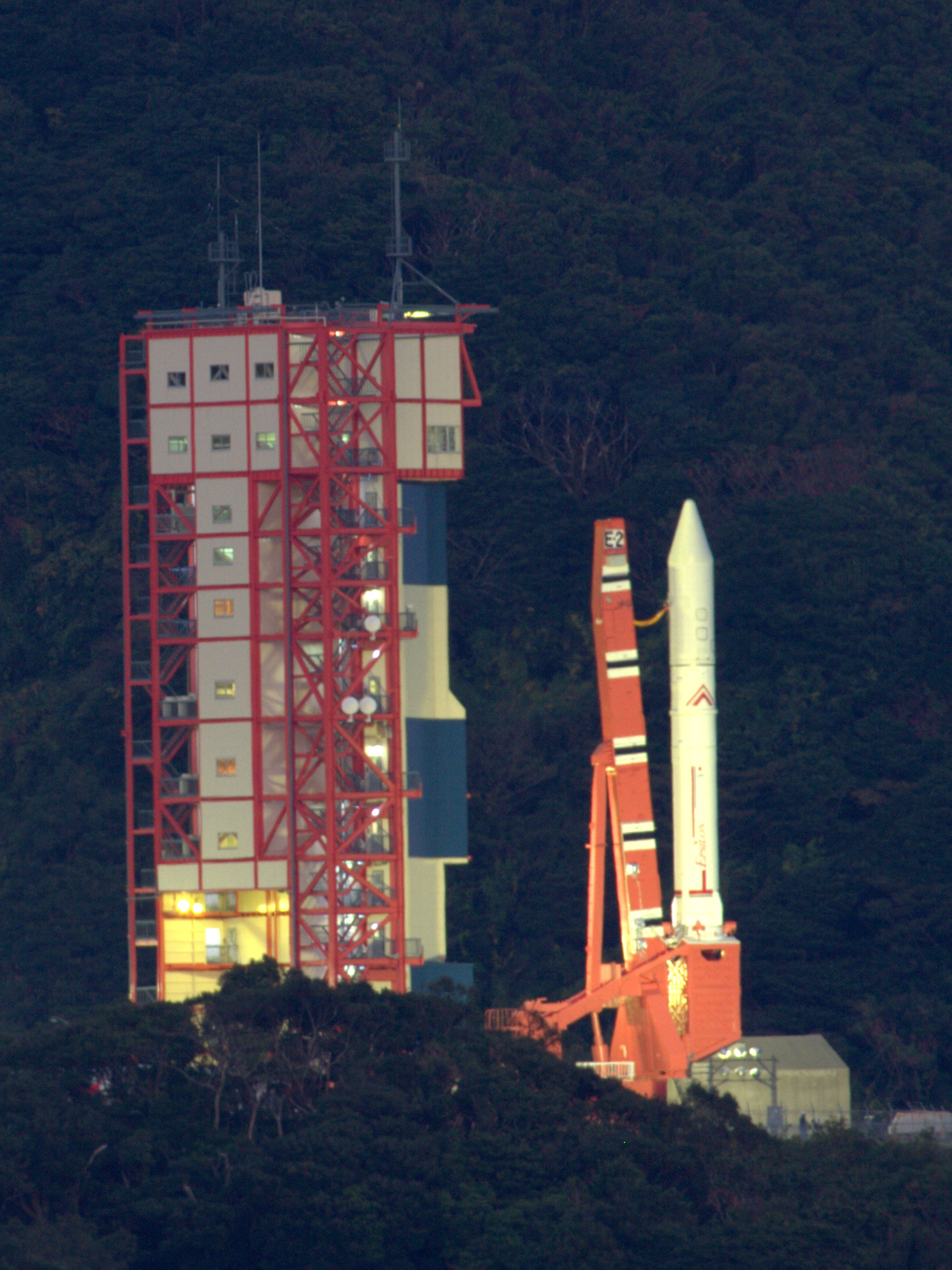 イプシロンロケット2号機によるジオスペース探査衛星「あらせ」(ERG)の打ち上げ。 宮原ロケット見学場より撮影。